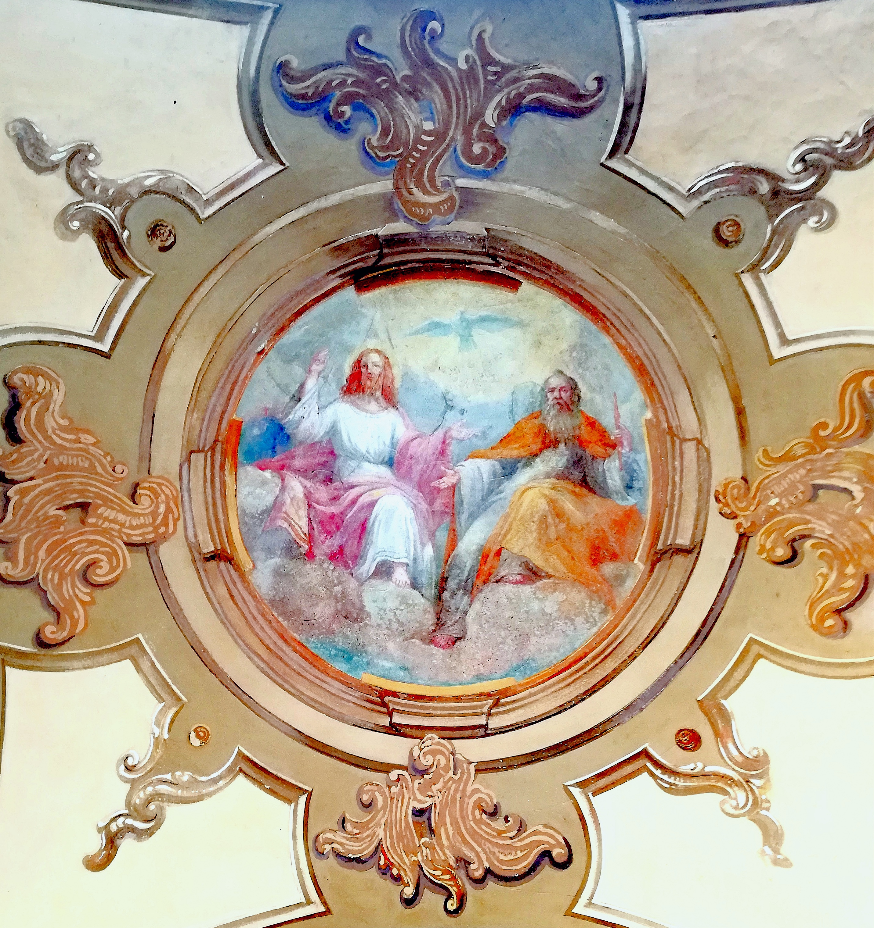 Trinità, Giulio Cortinovis, 1937